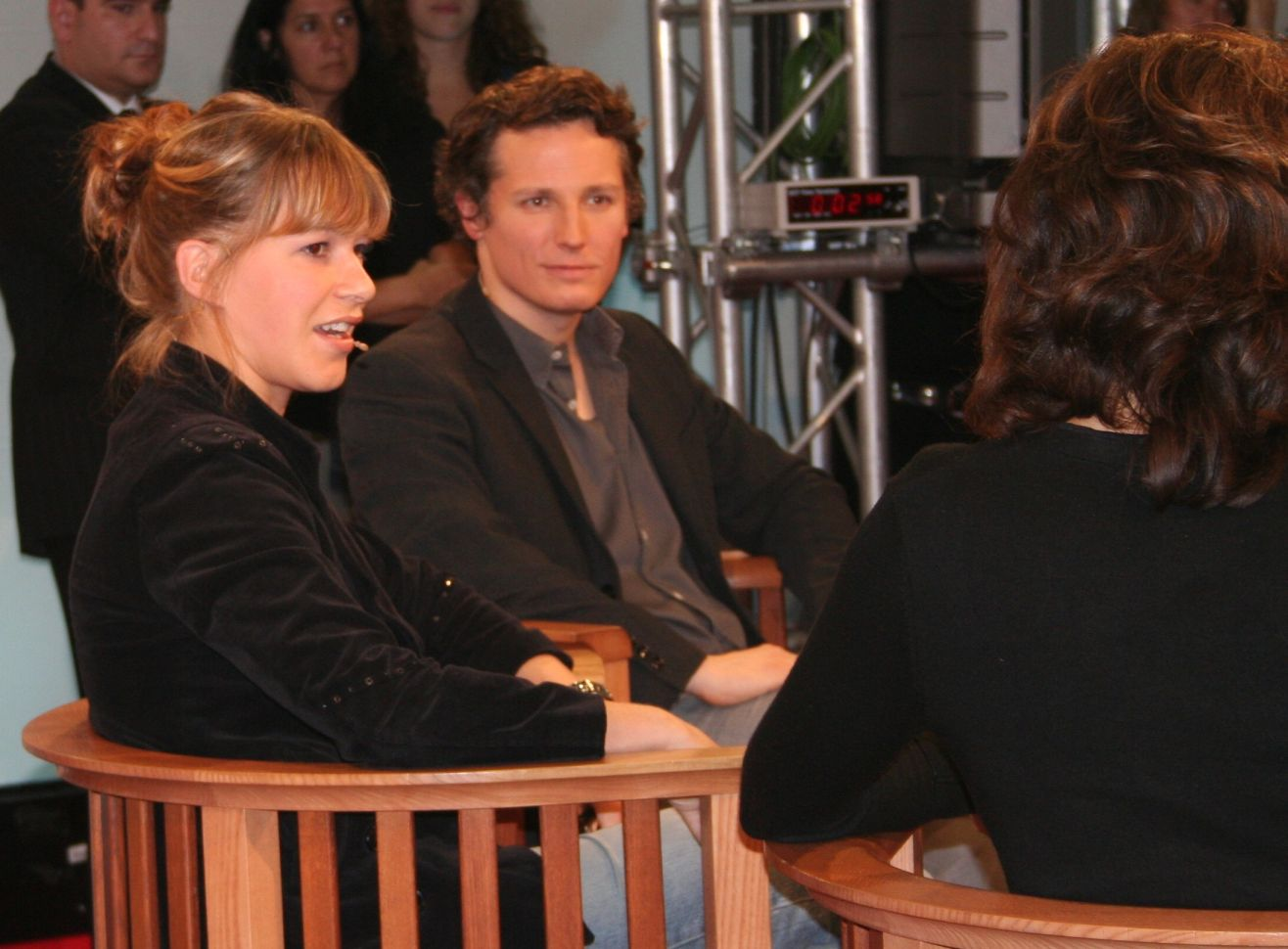 Franka Potente (pictured left) and actor Max Urlacher introduce their book "Los Angeles - Berlin. Ein Jahr" in the Interview at the stand of Hessischer Rundfunk (hr) at Frankfurter Buchmesse exhibition. Franka Potente (li.) und Schauspieler Max Urlacher stellen ihr Buch "Los Angeles - Berlin. Ein Jahr" im Interview am hr-Stand auf der Frankfurter Buchmesse vor.